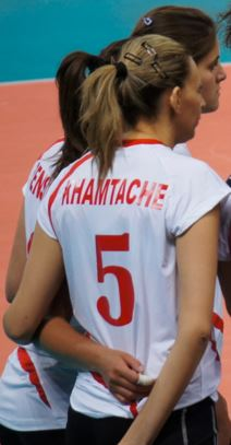 Amel Khamtache